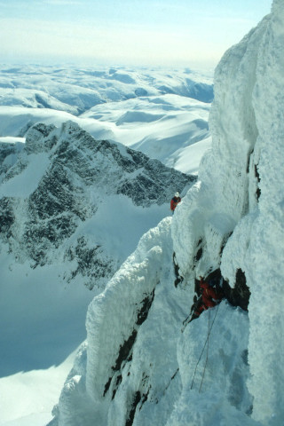 Klatrere på Galleriene på Storen en vinterdag i 1990. Foto: Marianne Gjørv.